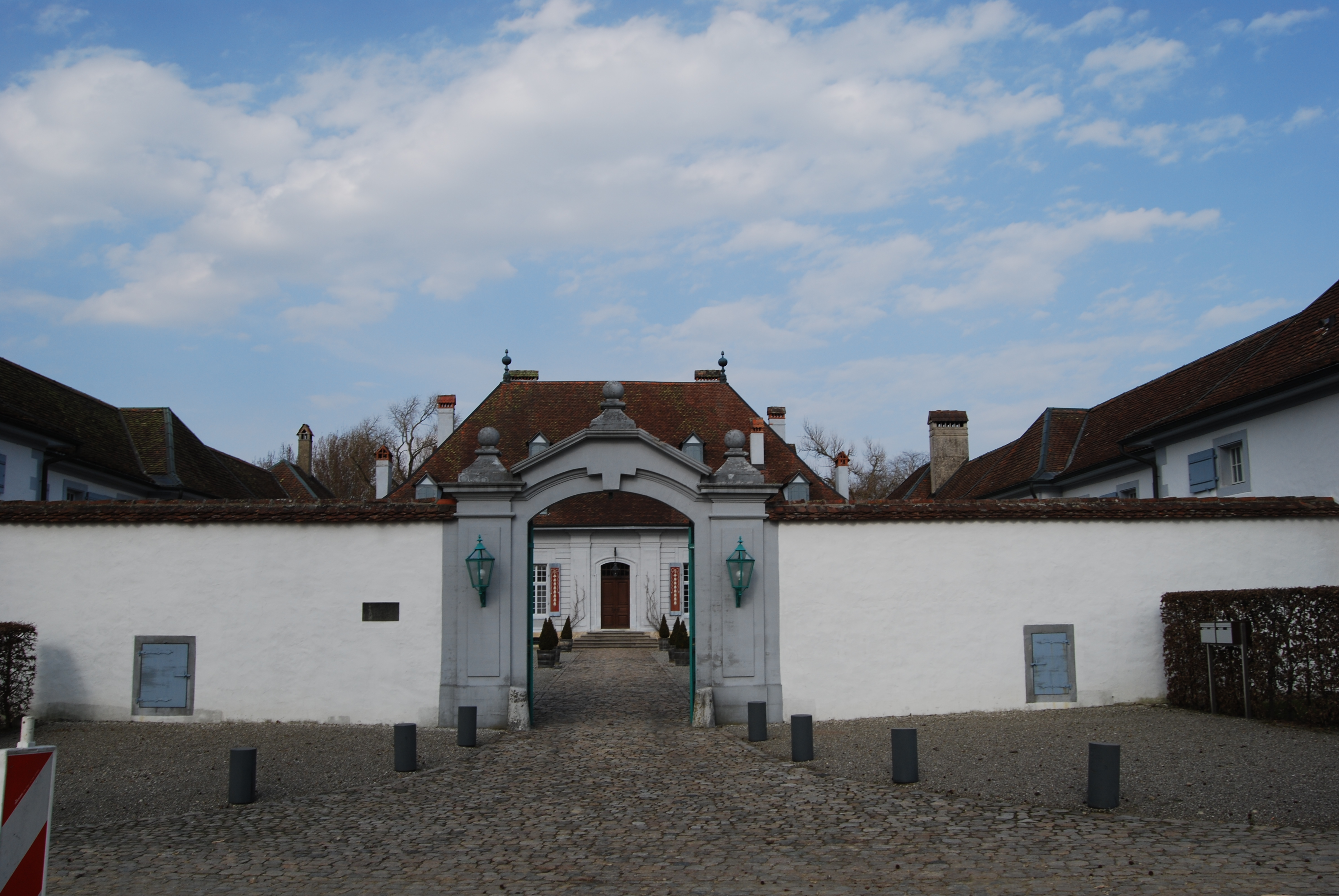 Kastelo Thunstetten, Kantono Berno, Svislando